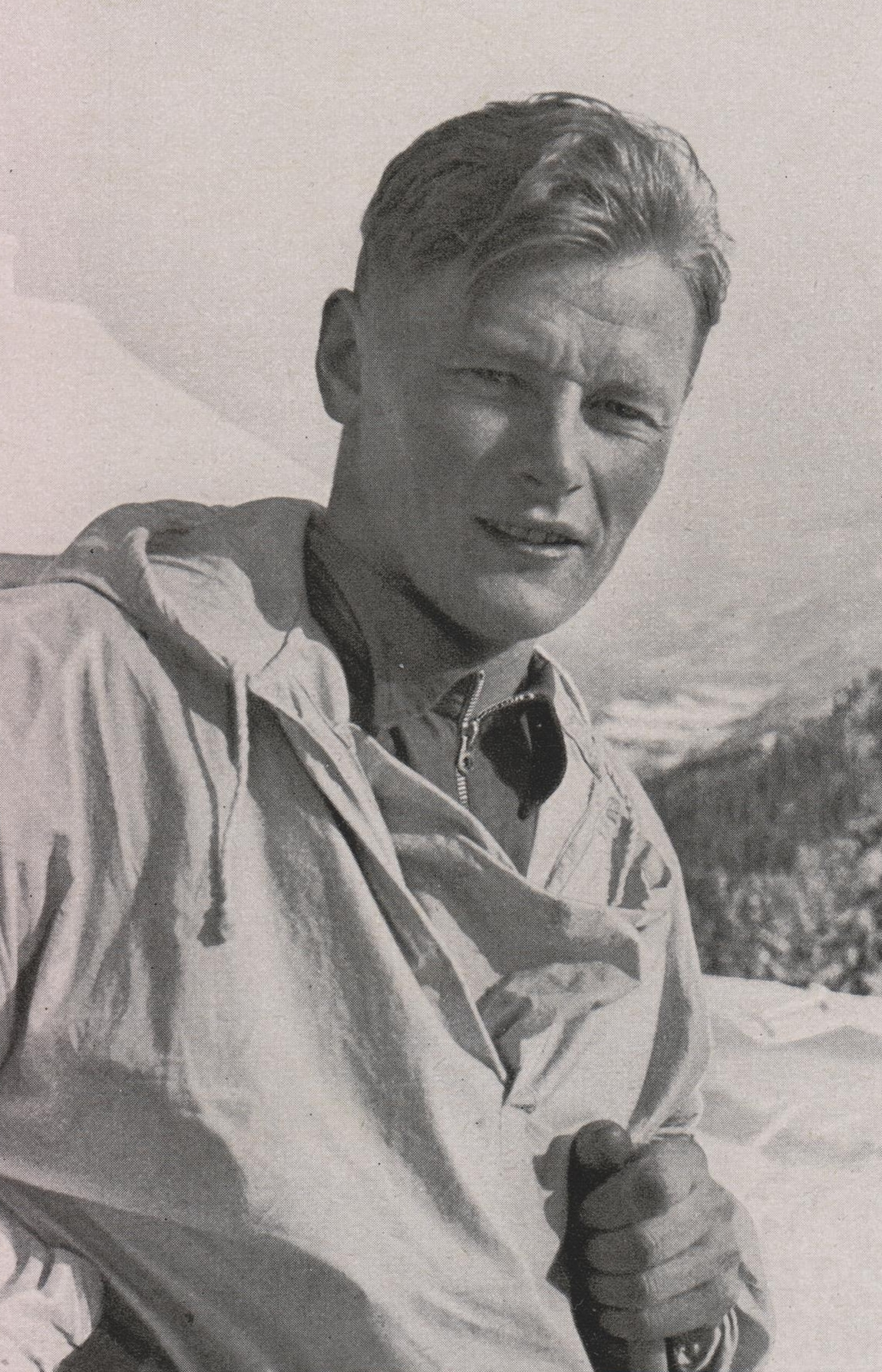 Lauri Valonen en 1936